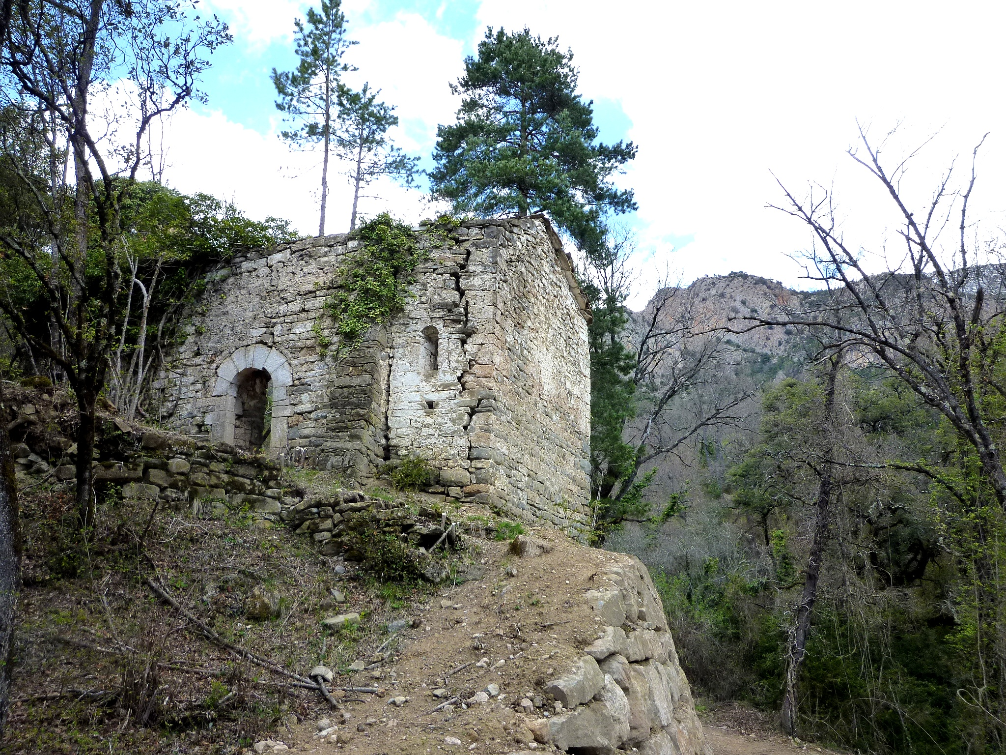 Església de Sant Andreu del Pujol del Racó (la Coma i la Pedra)